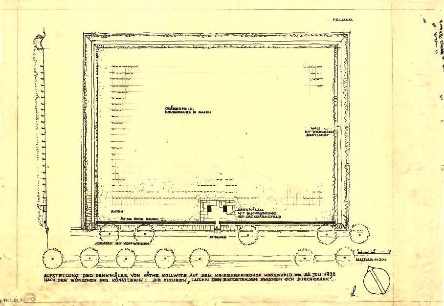 Situationsplan des Kriegerfriedhofes Roggeveld, Westflandern, Belgien: Aufstellung der zweiteiligen Skulpturengruppe Trauerndes Elternpaar (gewidmet Peter Kollwitz, 1896–1914) nach den Wünschen der Künstlerin am 23. Juli 1932 mit Blickrichtung auf das Gräberfeld. Die Figuren lassen die Besucher zwischen sich hindurchgehen.